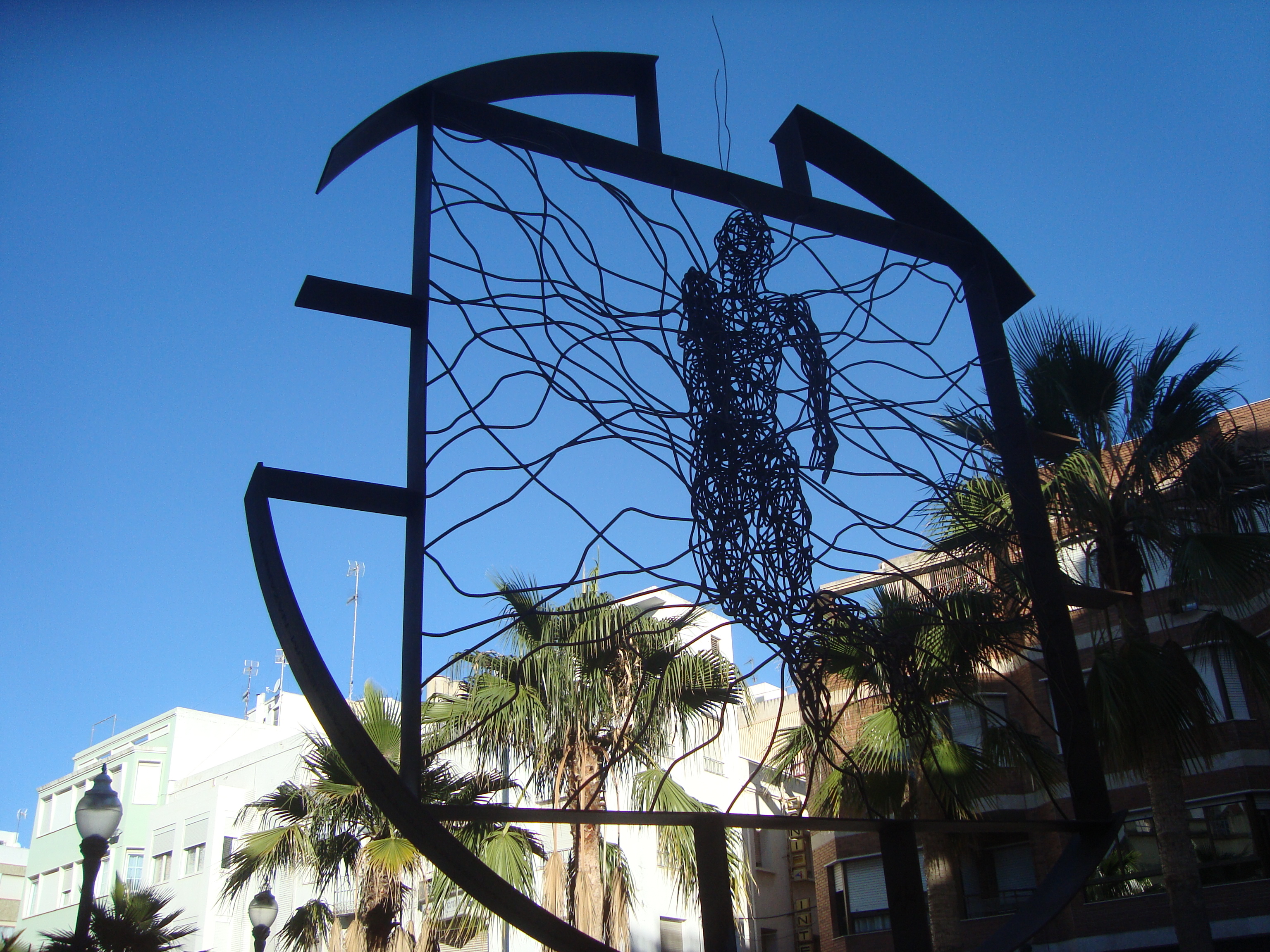 "Jesús Nazareno" obra del escultor vinarocense García Bel. Esta obra escultórica es un regalo de la Cofradía de Jesús Nazareno y del Santo Sepulcro a la ciudad de Vinarós.